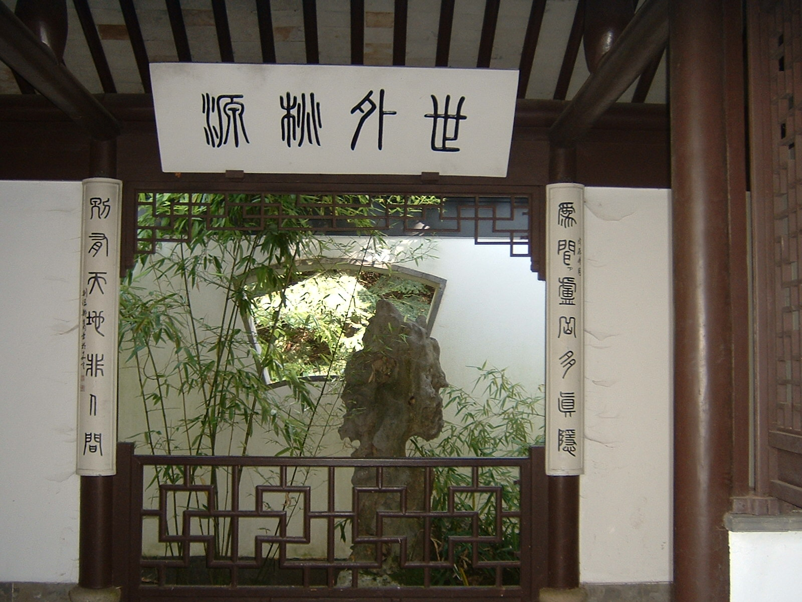 Archutektur im Chinesischen Garten, Bochum